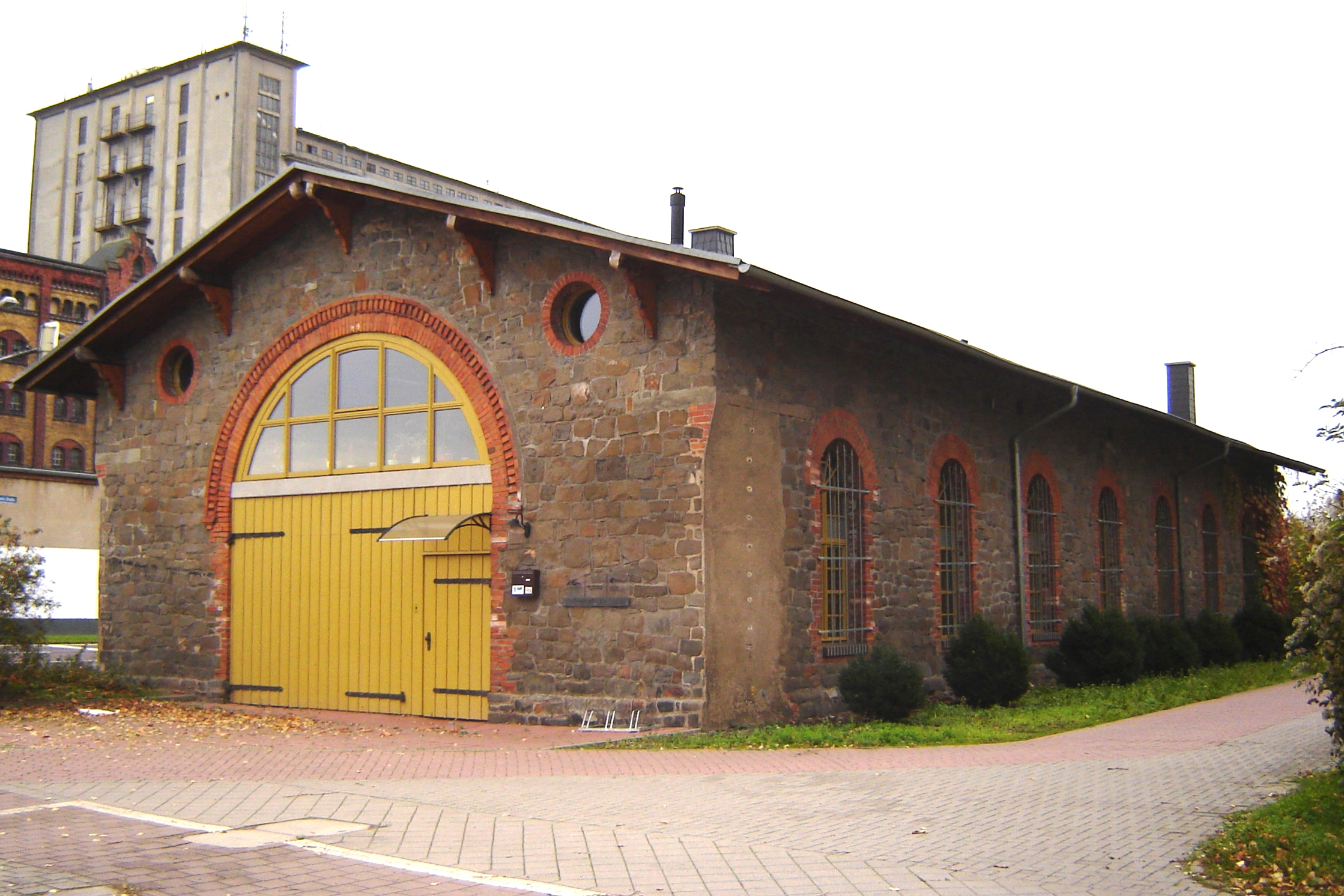 Magdeburg, Hafenstr. 9a (Kulturdenkmal)